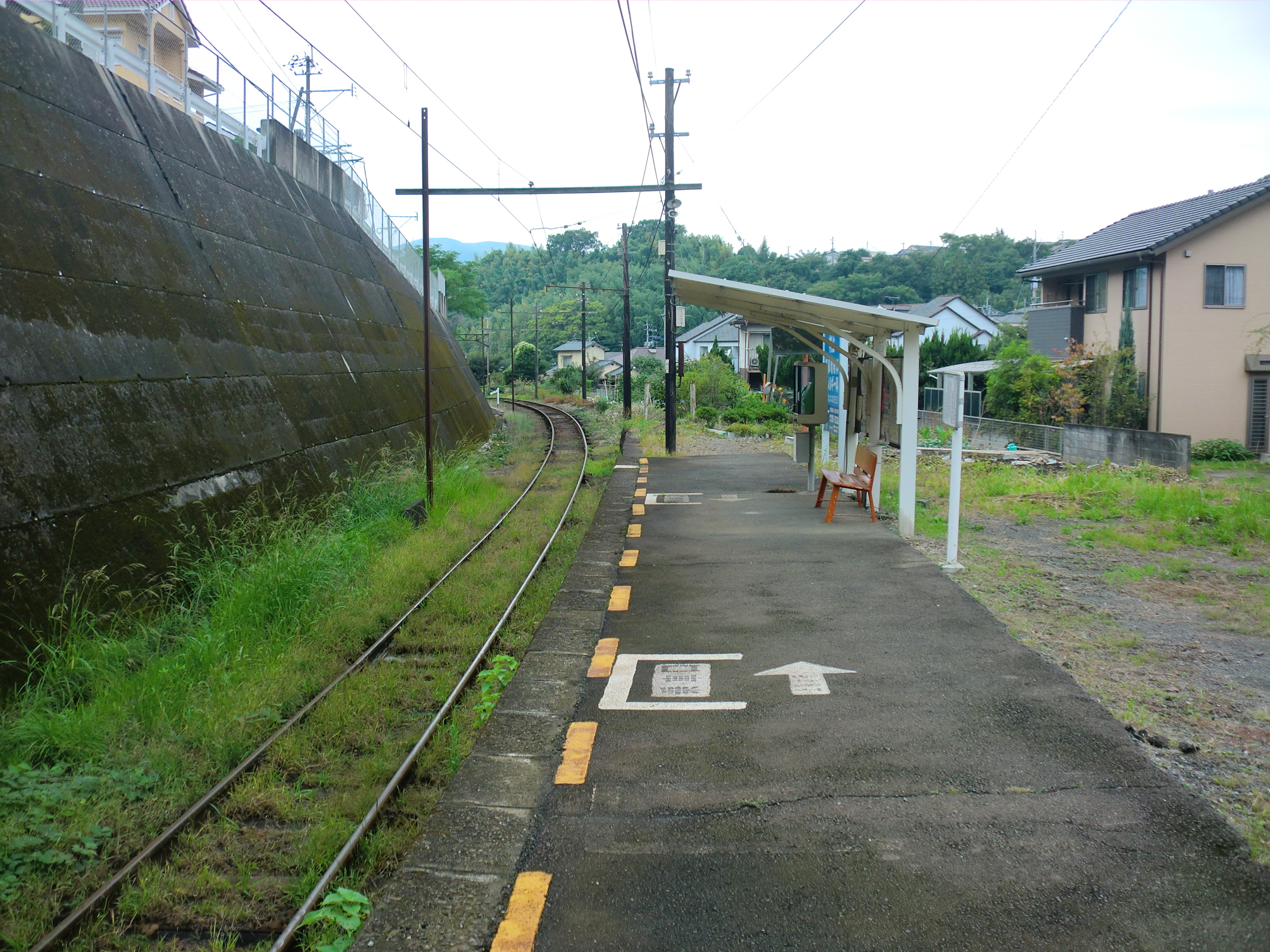 熊本電鉄池田駅のホーム